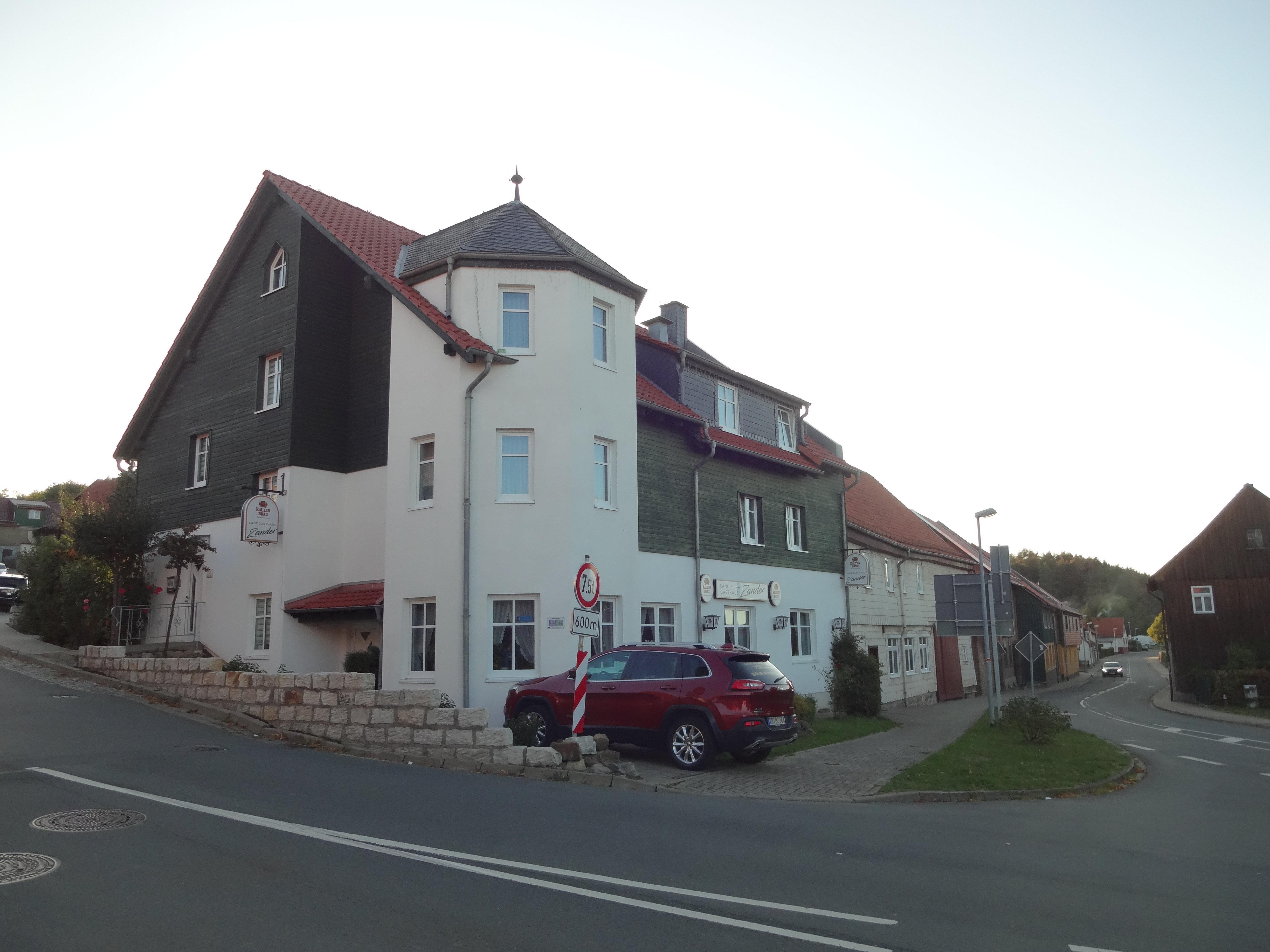 ehemals denkmalgeschütztes Wohnhaus in der Elbingeröder Straße 2 in Heimburg